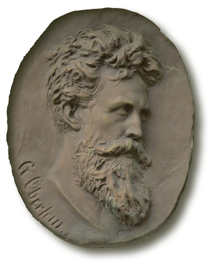 Gustav Eberlein, Bronzeguss an der Fassade eines Gebäudes in Hannoversch Münden, heute Hann. Münden